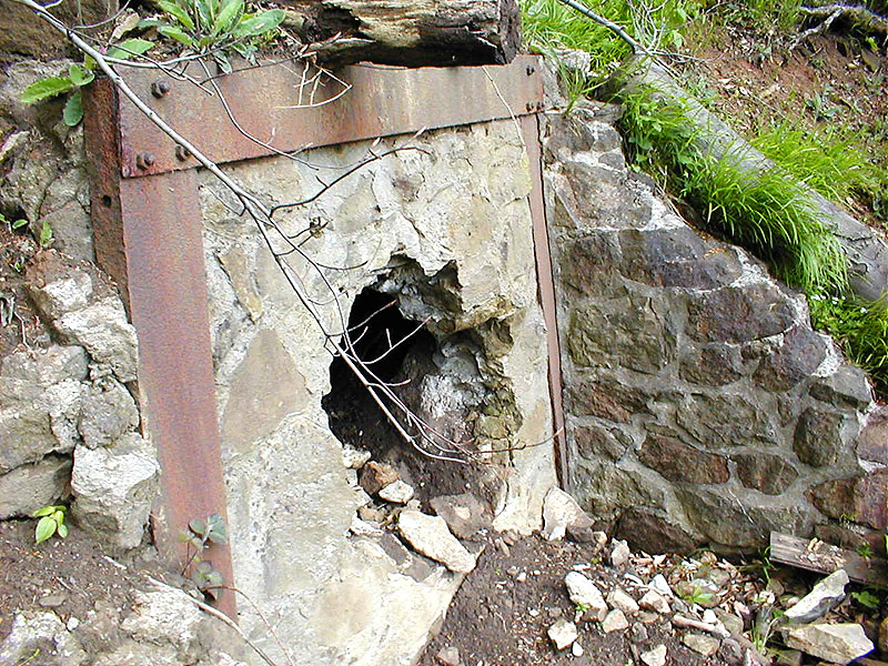 Ein Stollenmundloch des stillgelegten Denkmalstollens der Eisenerzgrube Porta. Erbaut im Jahre 1941 bei der Anlegung des Denkmalstollens auf der Südseite des Wiehengebirge. Das Mundloch befindet sich bei Dehme, Stadt Bad Oeynhausen, Nordrhein-Westfalen, nahe der Wittekindsbrg